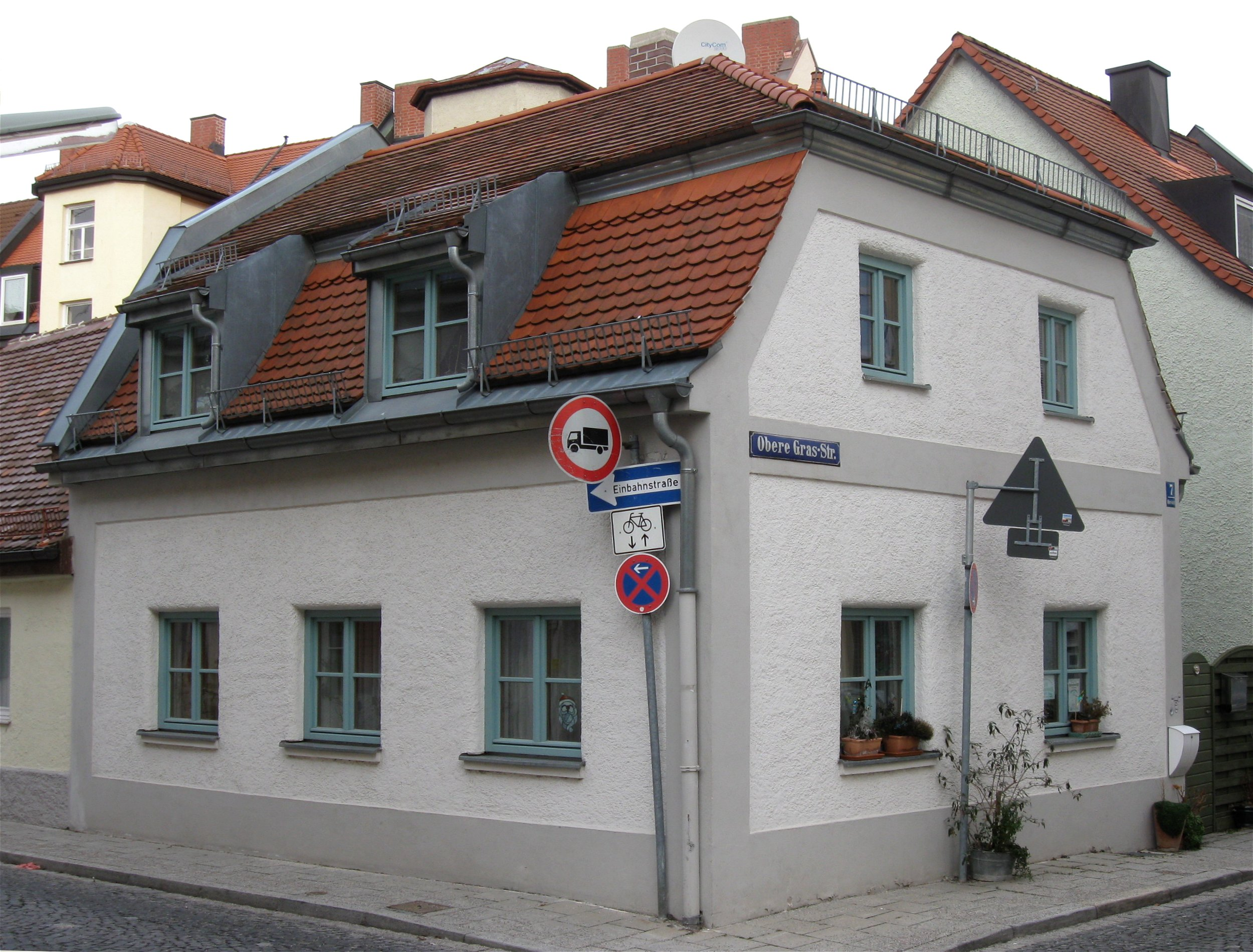 Obere Grasstraße 7; Erdgeschossiges Kleinhaus mit Mansarddach, in Ecklage, um 1840/45.